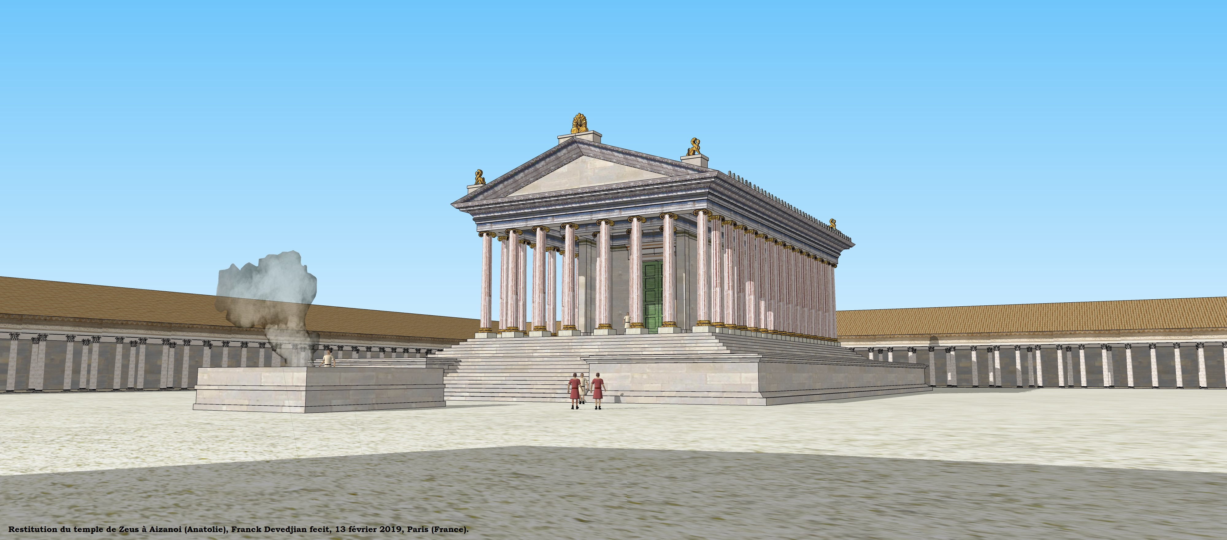 Aizanoi